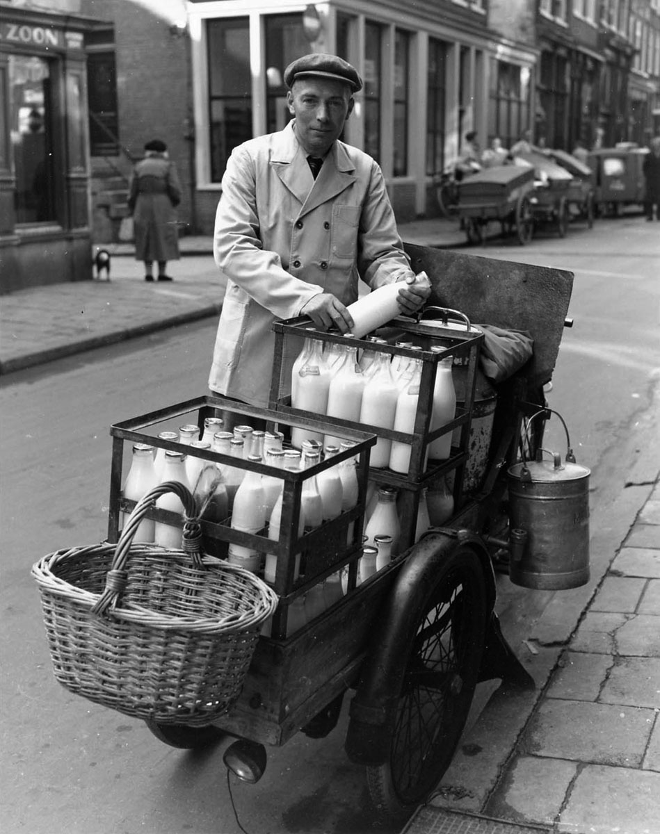 Melkboer J. van der Tas uit de Jordaan met bakfiets vol met melkflessen, Amsterdam, 24 september 1953 Foto Ben van Meerendonk / AHF, collectie IISG, Amsterdam